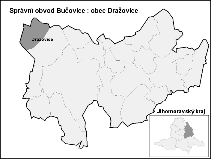 Hranice Dražovice (Vyškov-(Bučovice)- Czech republic)